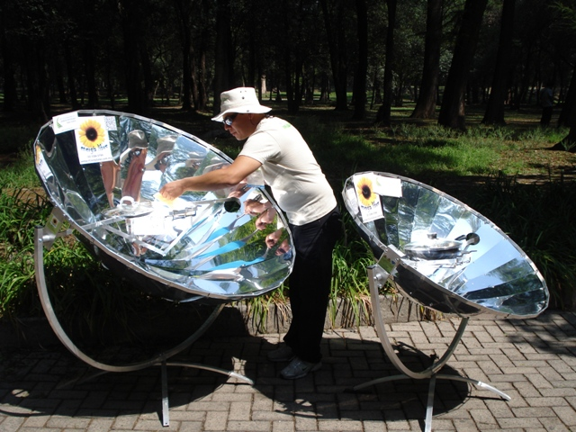 Diversos tamaños de cocinas solares (México)